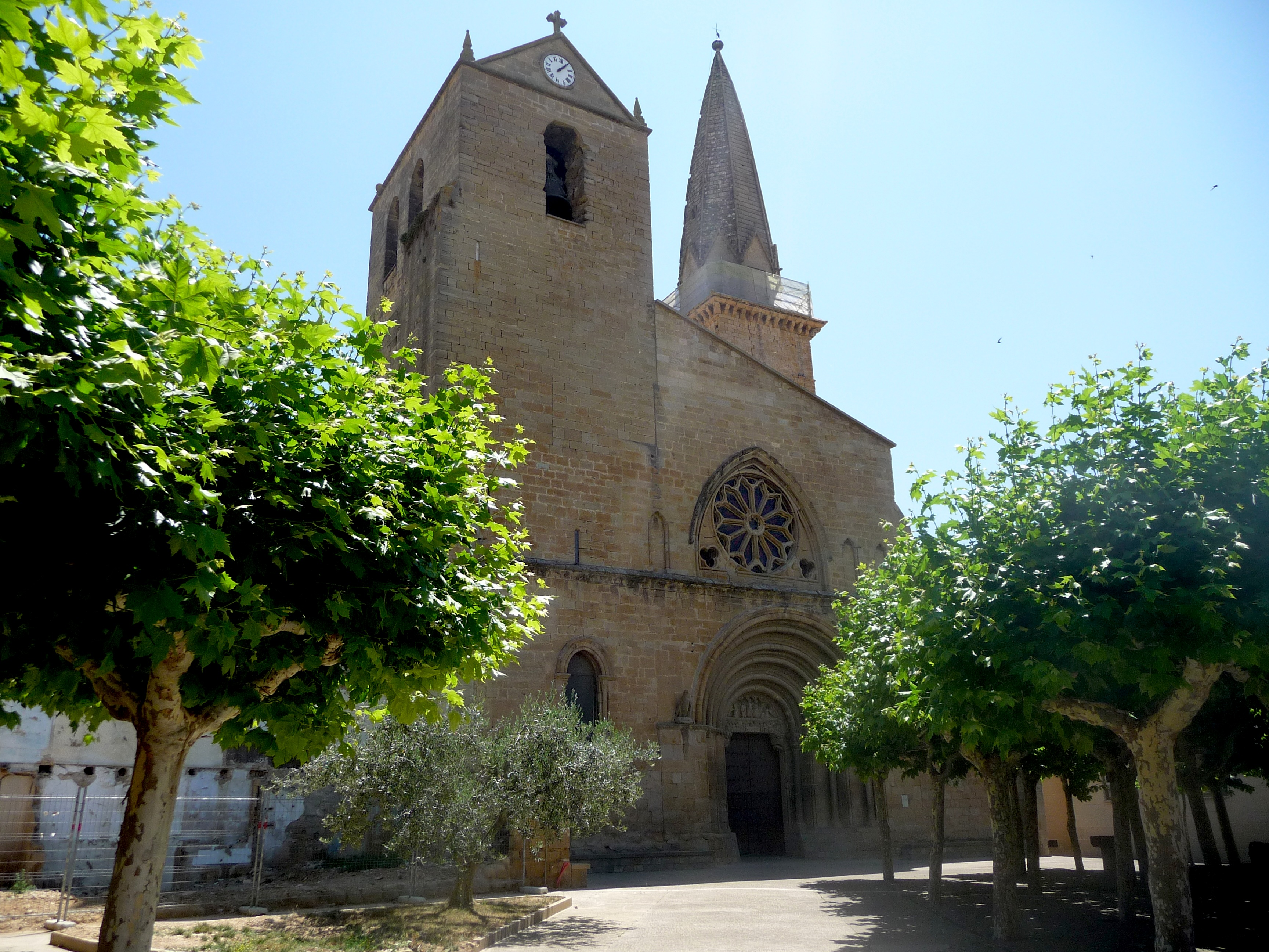 L'église d'origine romane puis agrandie à l'époque baroque est la plus ancienne de la cité